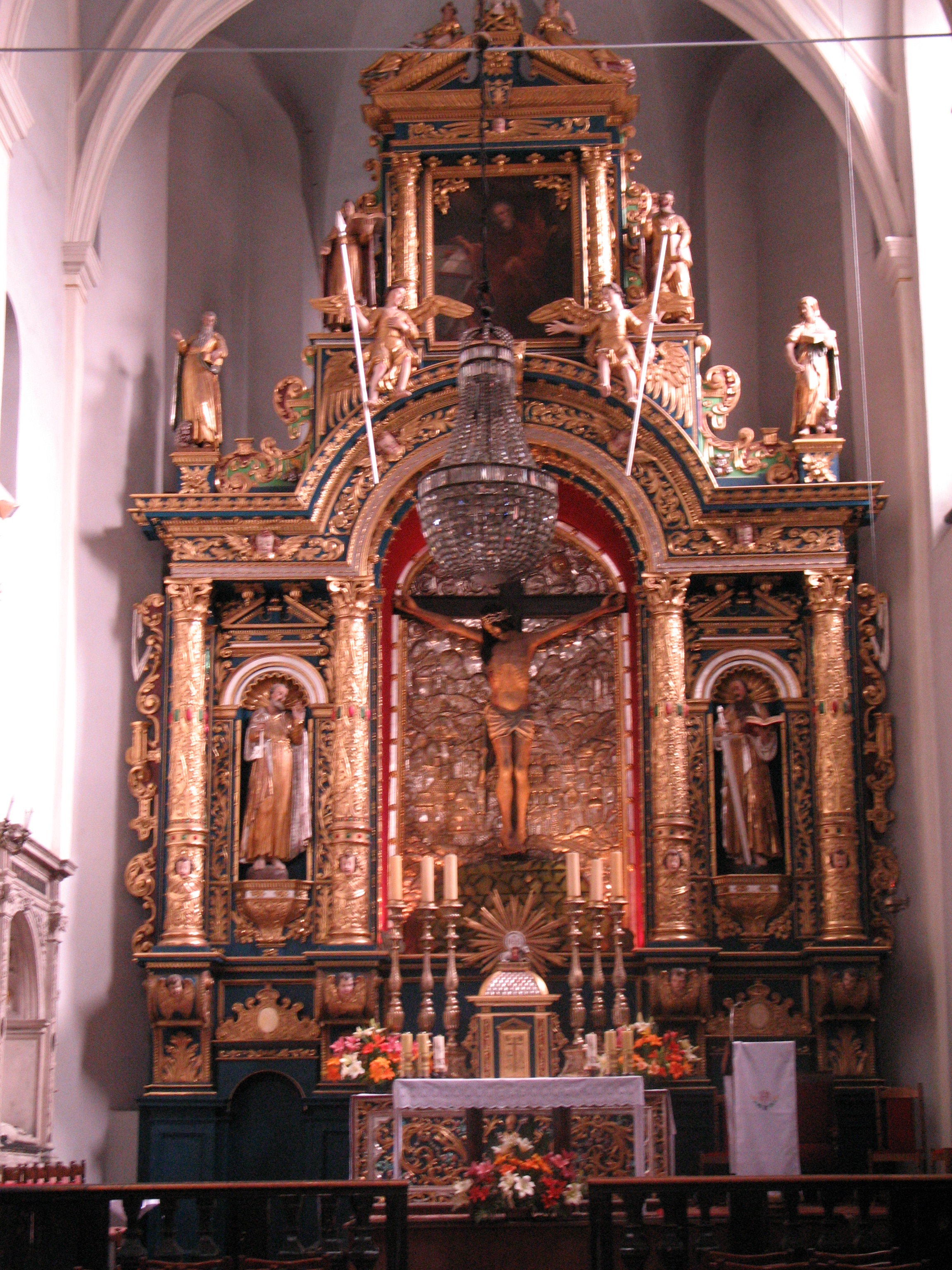 św. Marka in Kraków, Poland